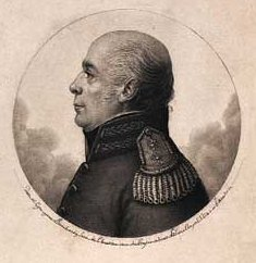 Peter Lotharius Oxholm (10.7.1753-27.7.1827), dansk officer og godsejer